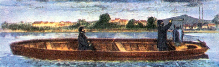 Ilustraţie a experimentului din 13 august 1886 a ambarcaţiunii lui Alexandru Ciurcu şi Just Buisson